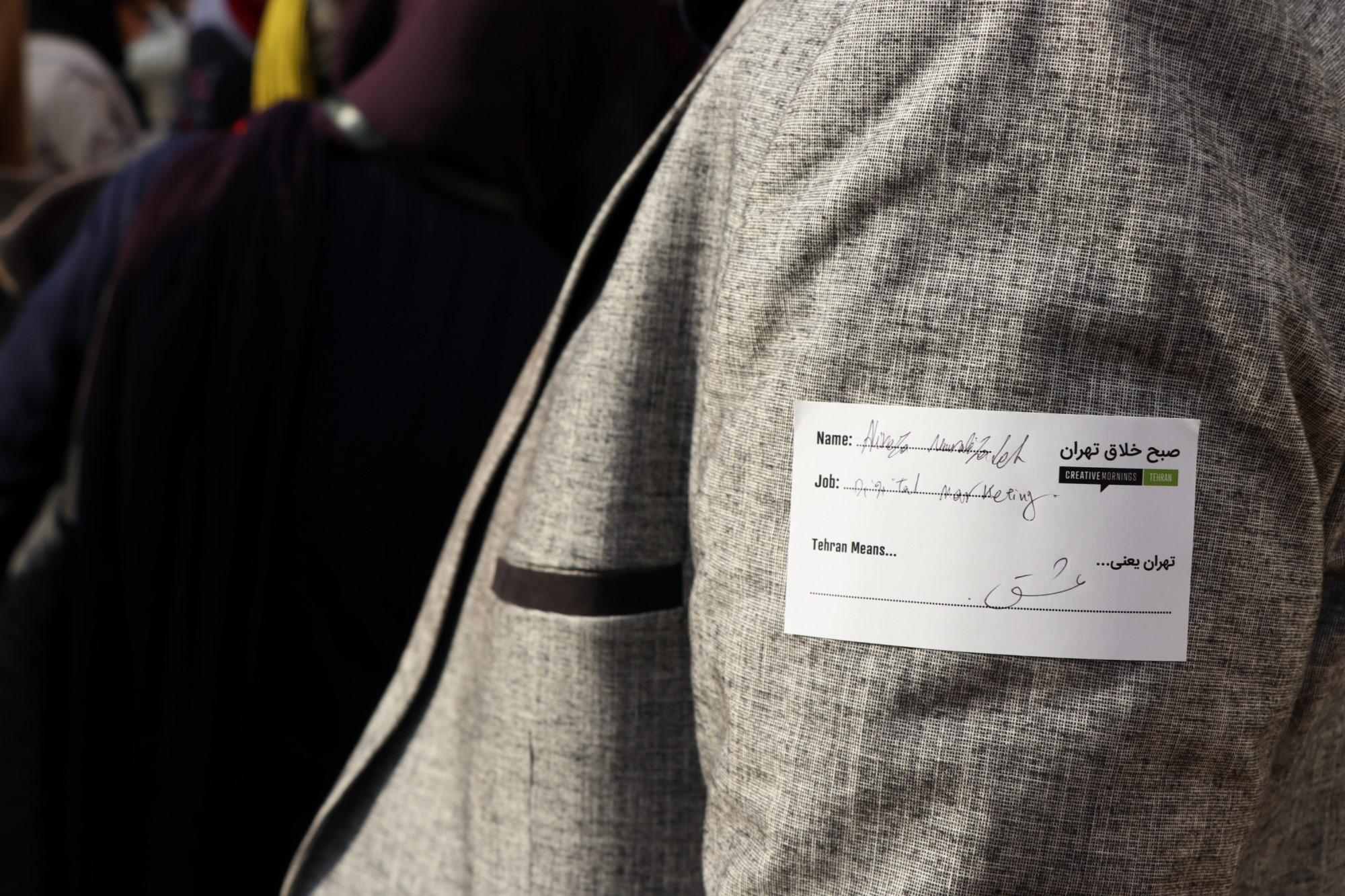 برچسب یخ شکن در رویداد صبح خلاق تهران